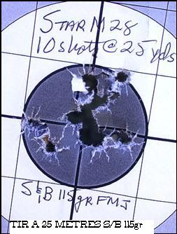 Cible d'essais de pistolet Star 28 M